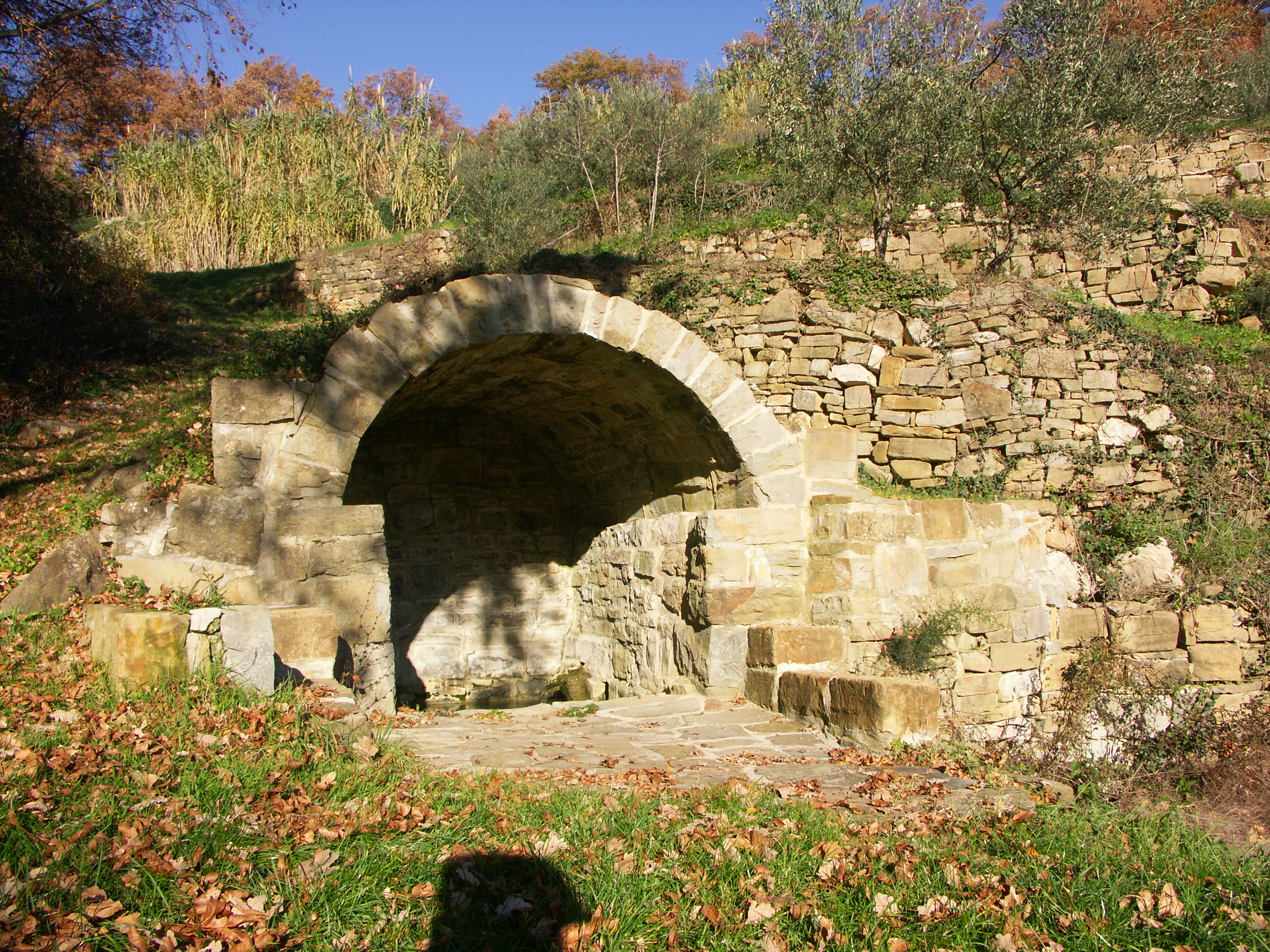 Vodno zajetje pod Novo vasjo